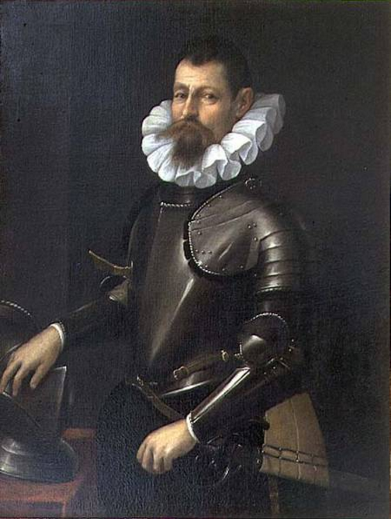 Cesare d'Este (1552-1628), Herzog von Modena und Reggio, Modena, Galleria Estense